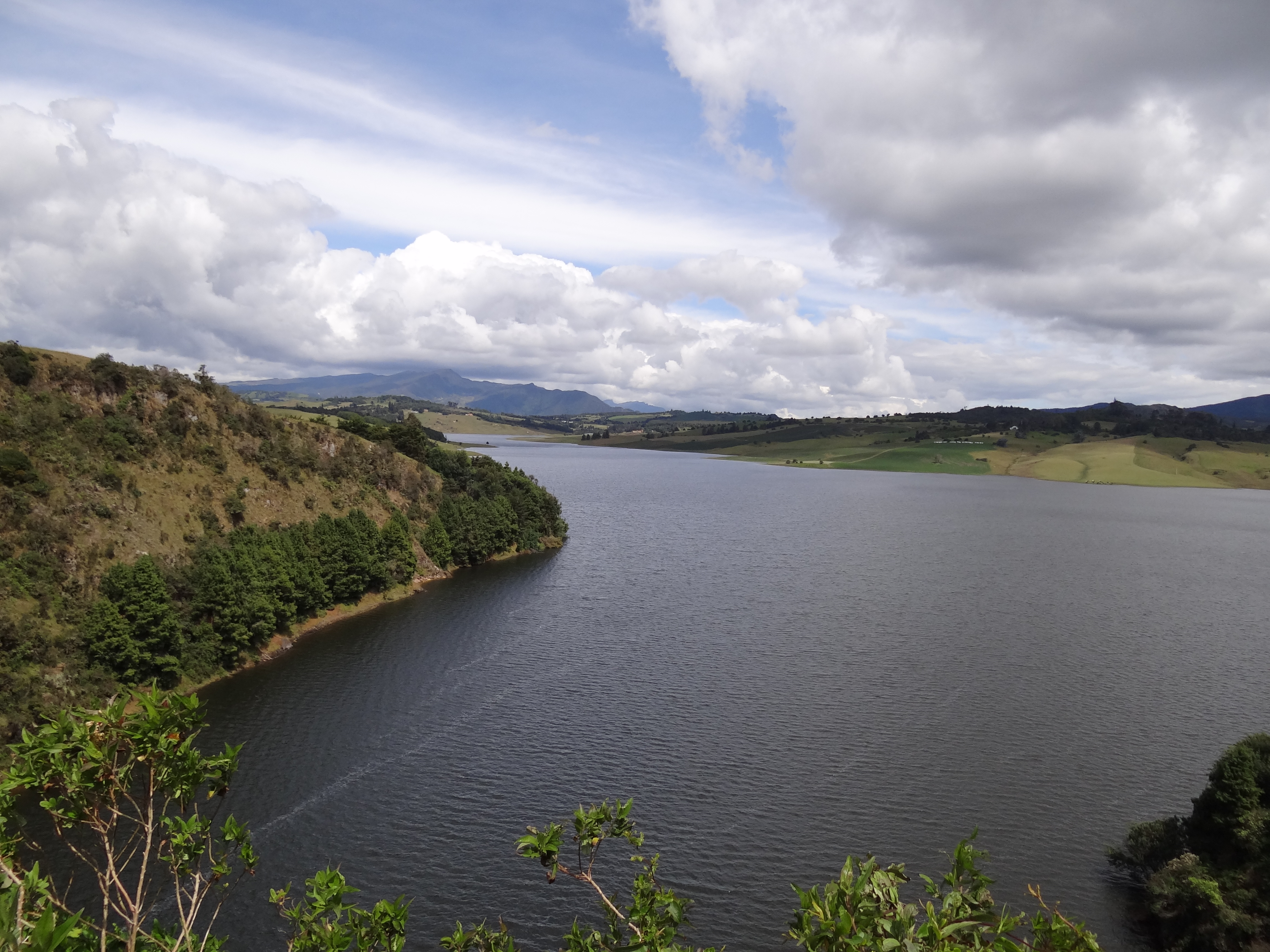 Embalse del Sisga en el municipio de Chocontá, departamento de Cundinamarca, Colombia